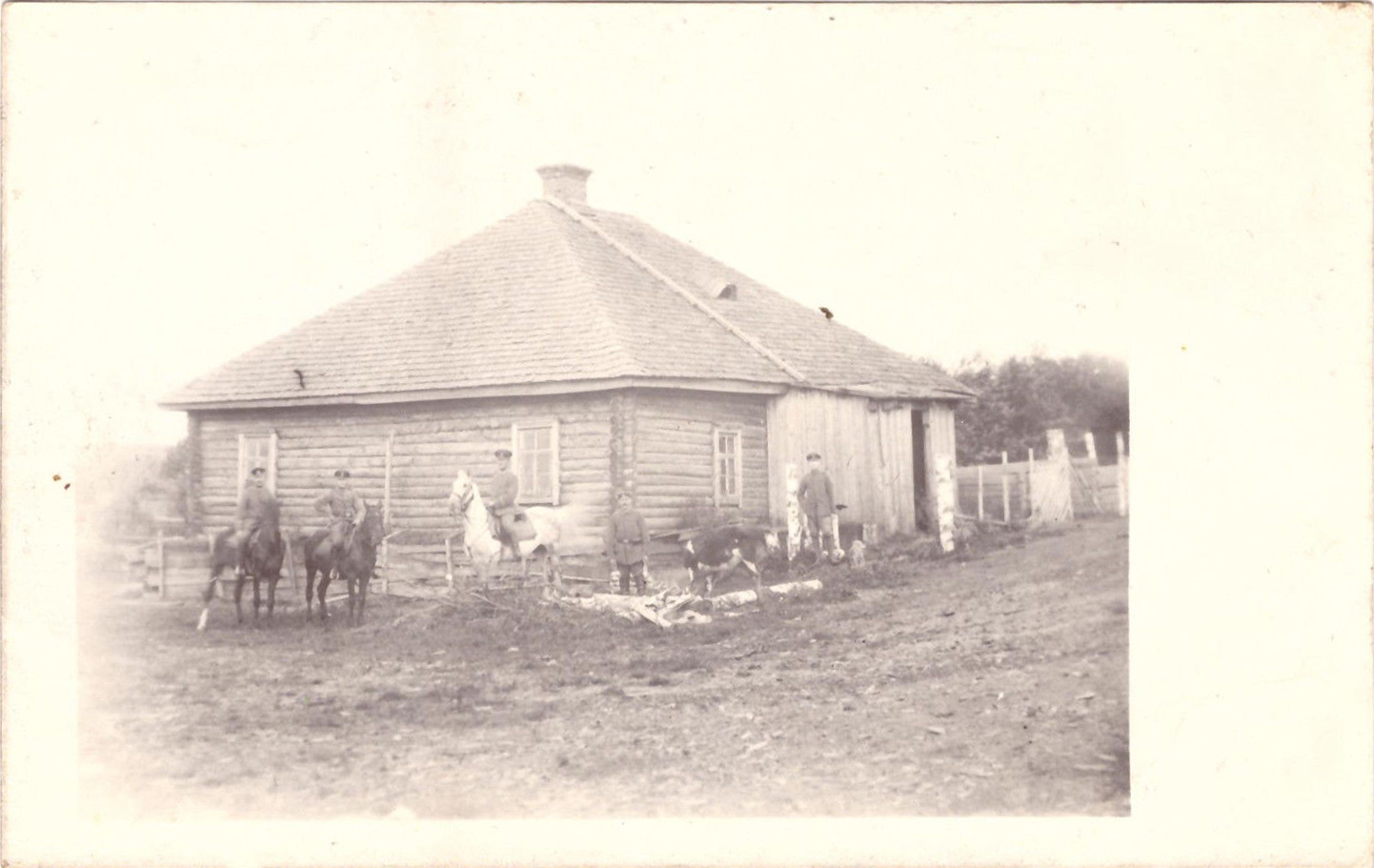 Беларуская (тарашкевіца): Абольцы (Abolcy)